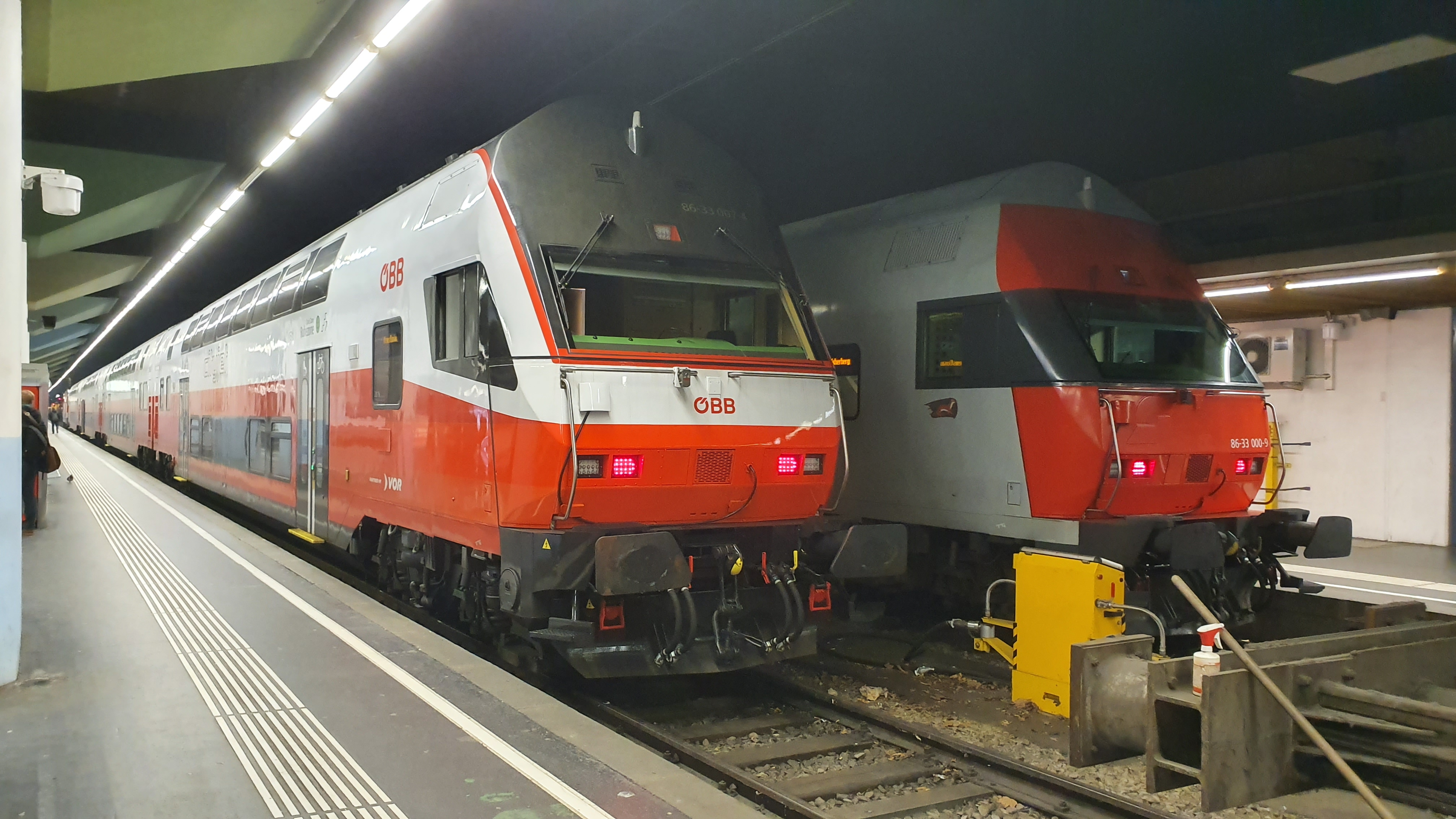 Der CJ-Dosto-Steuerwagen 86-33 007 steht in Wien Franz-Josefs-Bahnhof neben dem im Ursprungsdesign gehaltenen 86-33 000.